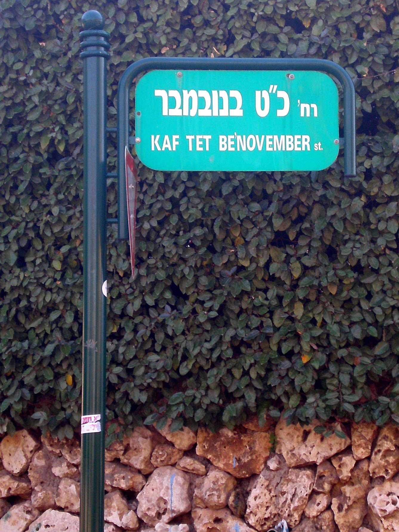 Kaf tet benovember st., Ramat Hasharon, Israel